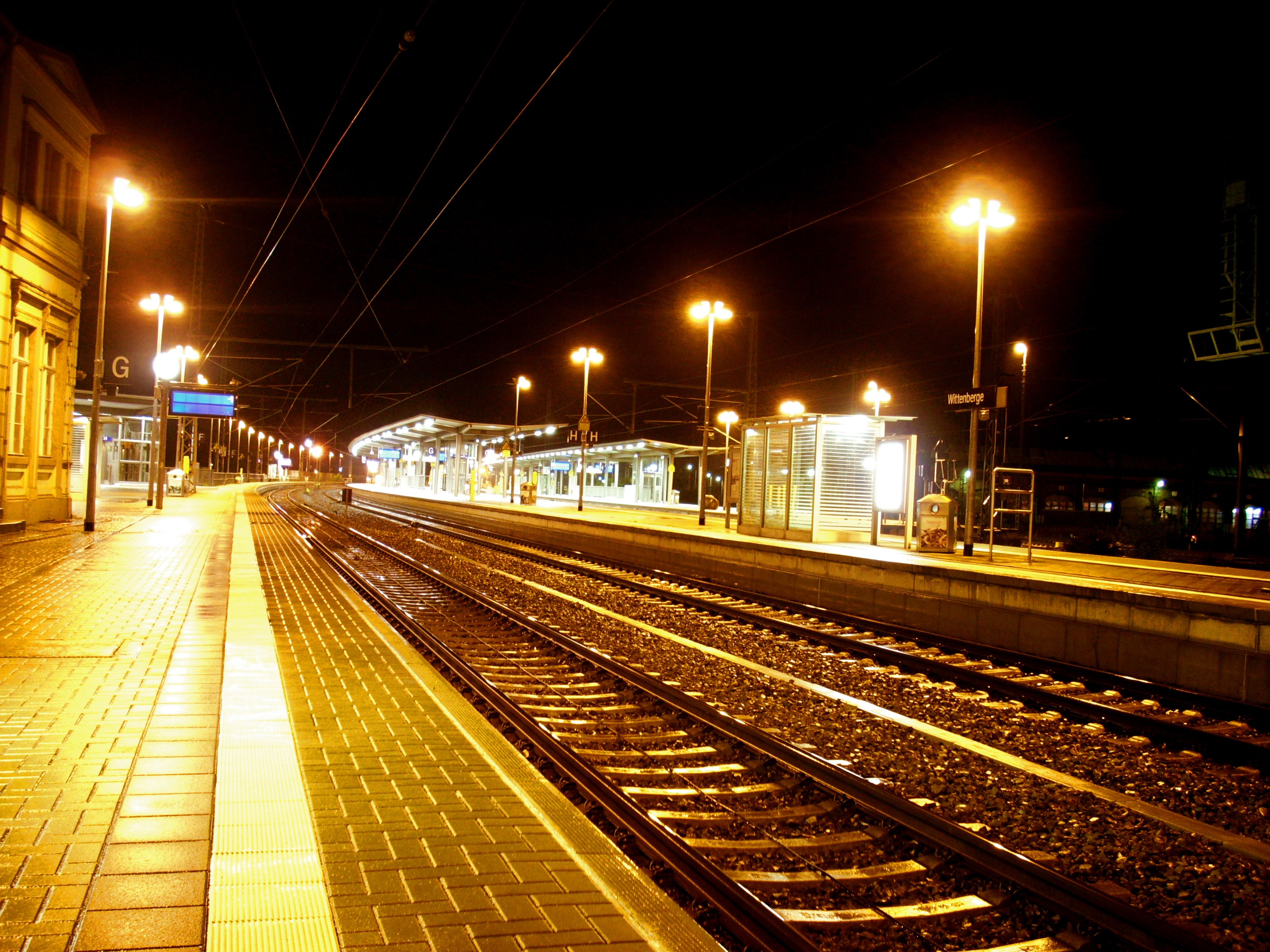 Bahnhof Witttenberge.